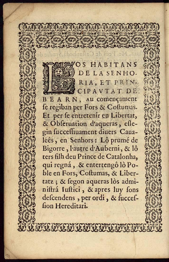 Nouveau For de Béarn, édition 1625.